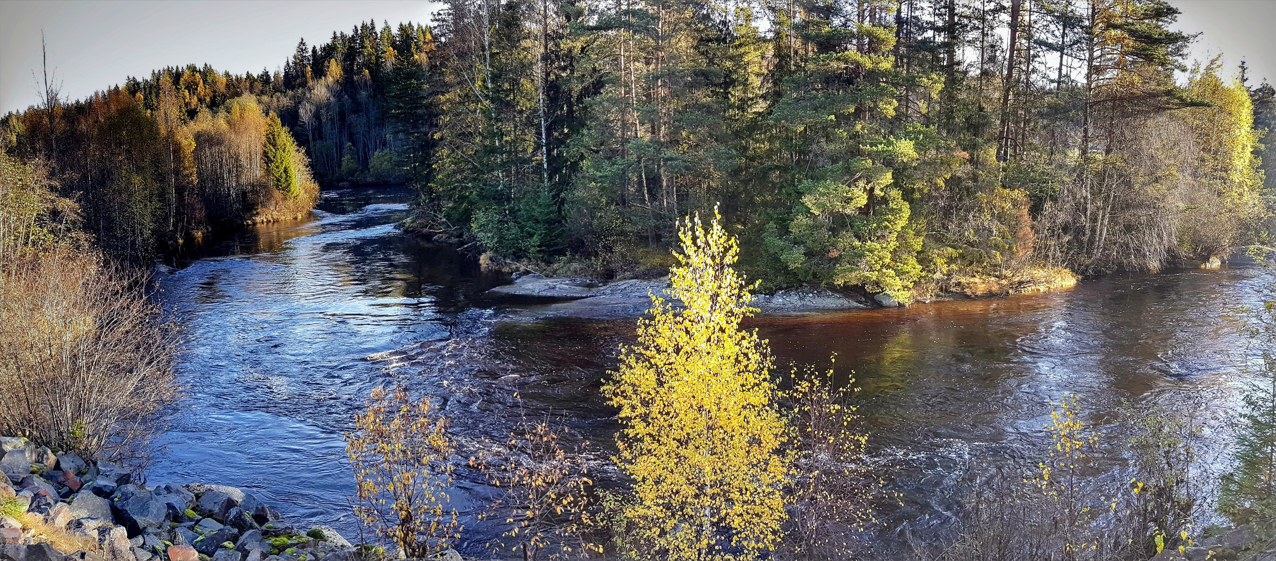 Sogna oppstrøms Heiern, Ringerike, Buskerud